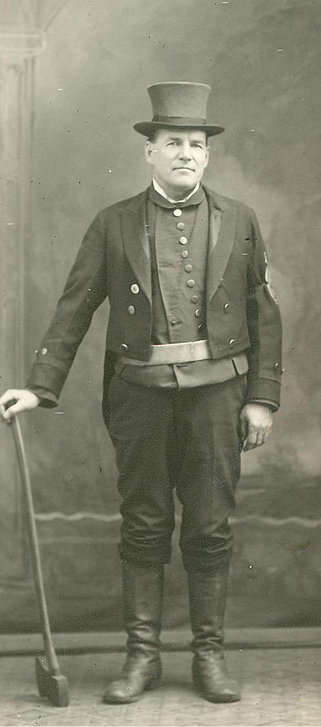 Pompier dans les années 1820. - [19-]. - 1 photographie. VM6,S10,D1004.1